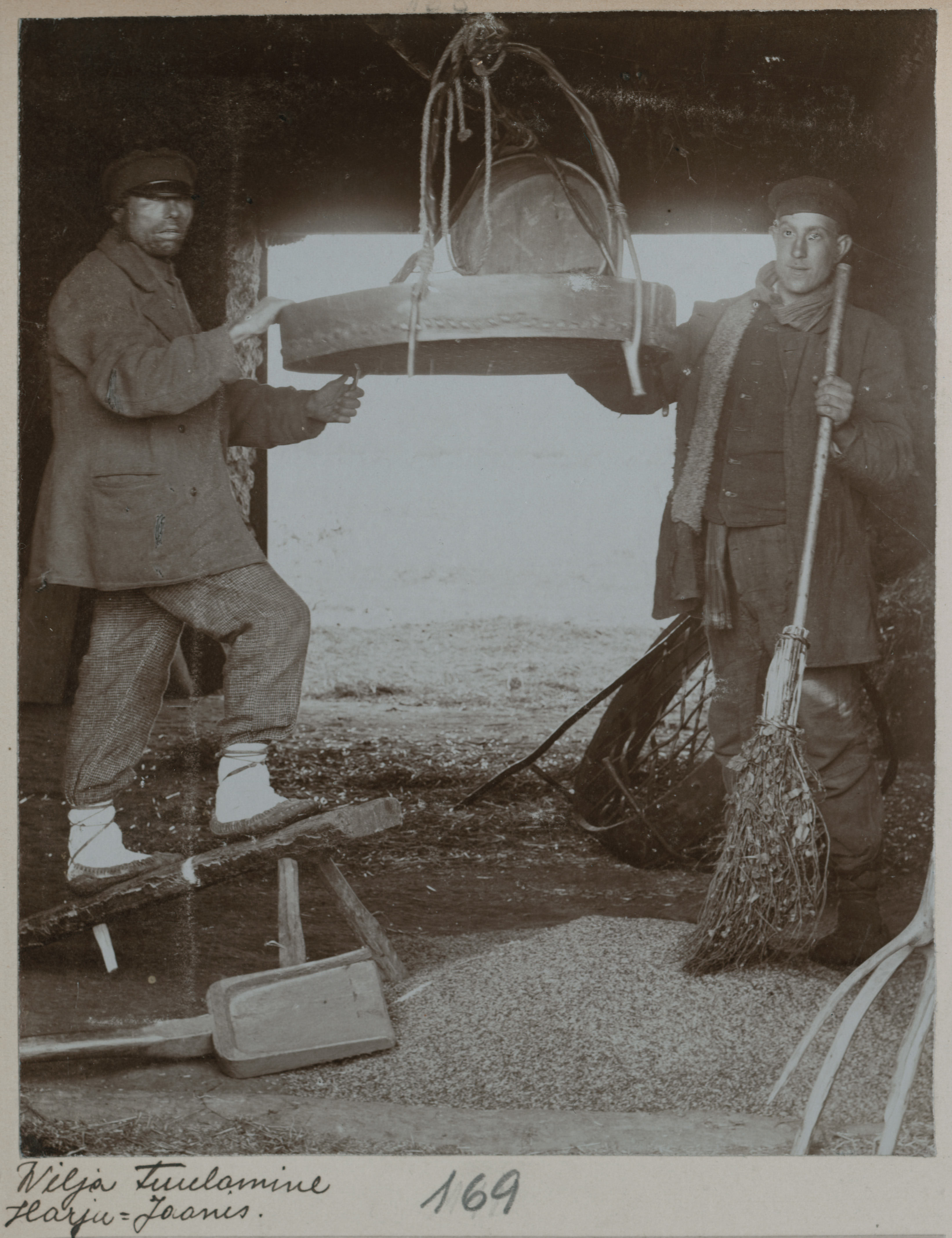 vilja tuulamine Harju-Jaanis